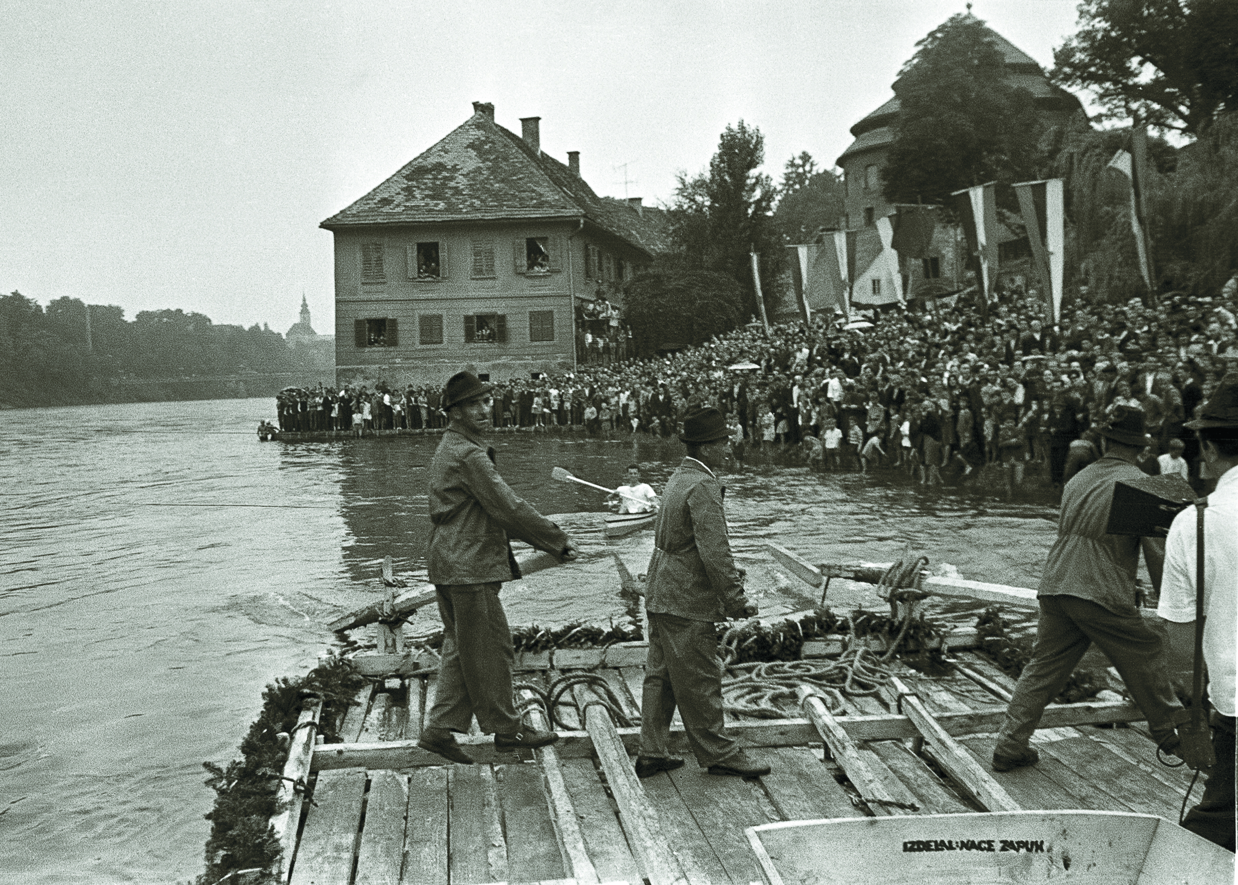 Odplul zadnji dravski splav iz Maribora.